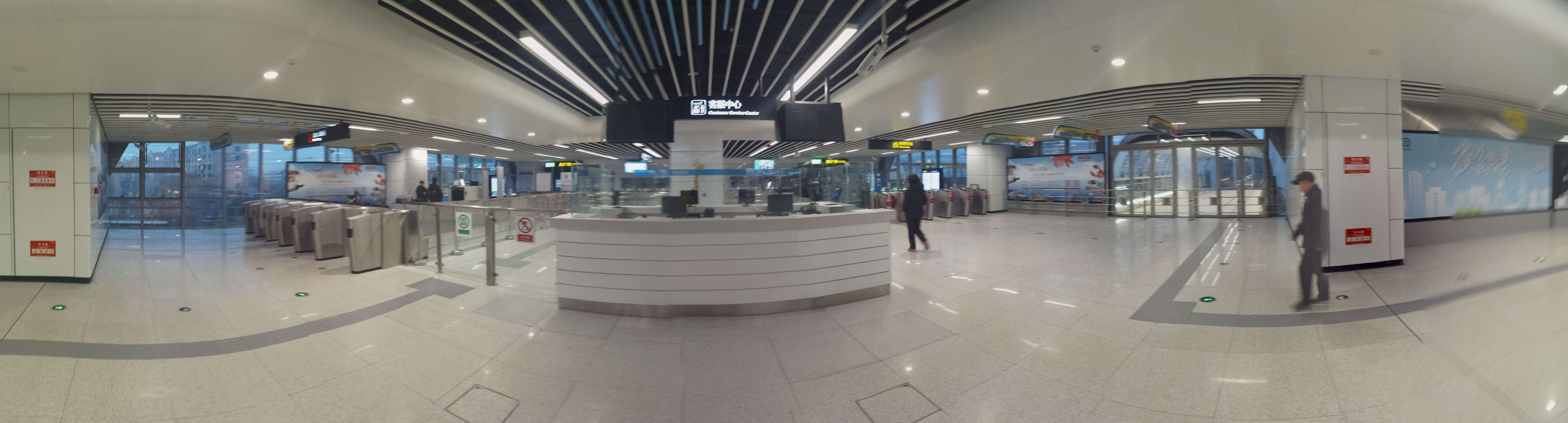 中文（中国大陆）: 青岛地铁双珠路站站厅（左为A出口，右为B出口）